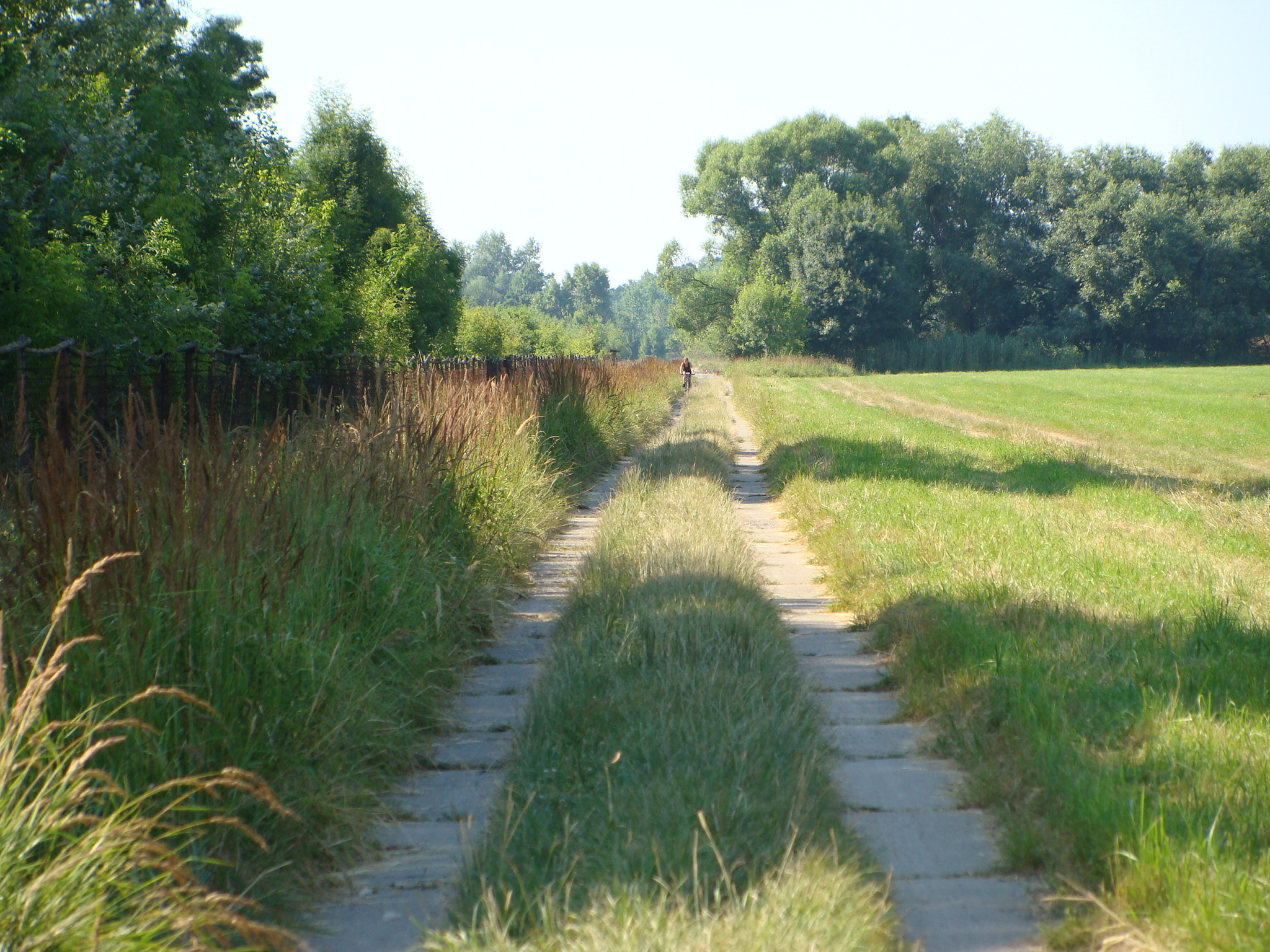 Kolonnenweg und Zaunreste entlang der Thaya nahe Břeclav (Lundenburg)